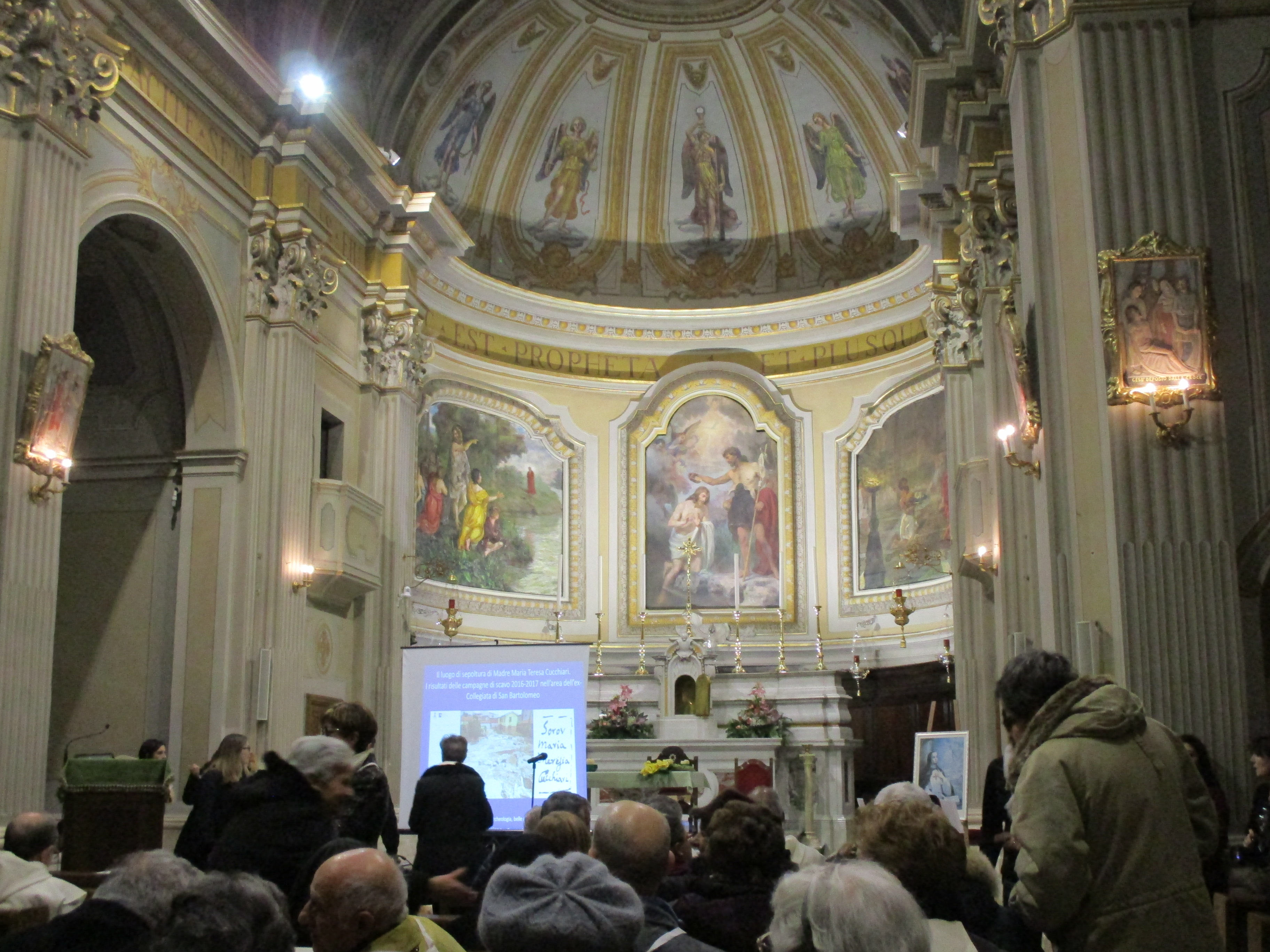 Incontro ad Avezzano sulla figura di Madre Maria Teresa Cucchiari